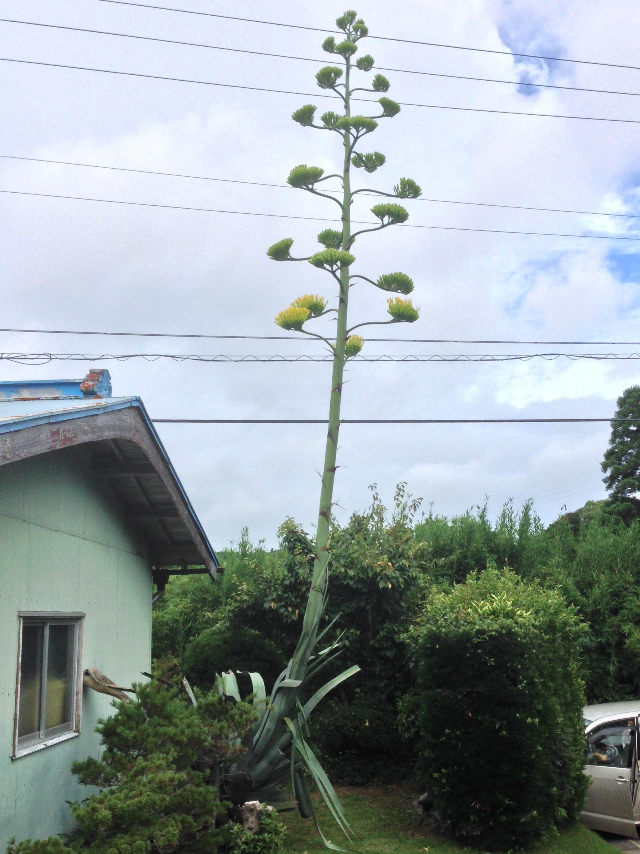 アオノリュウゼツランの開花（植えてから50年以上経過）、千葉県いすみ市の民家にて[1]。